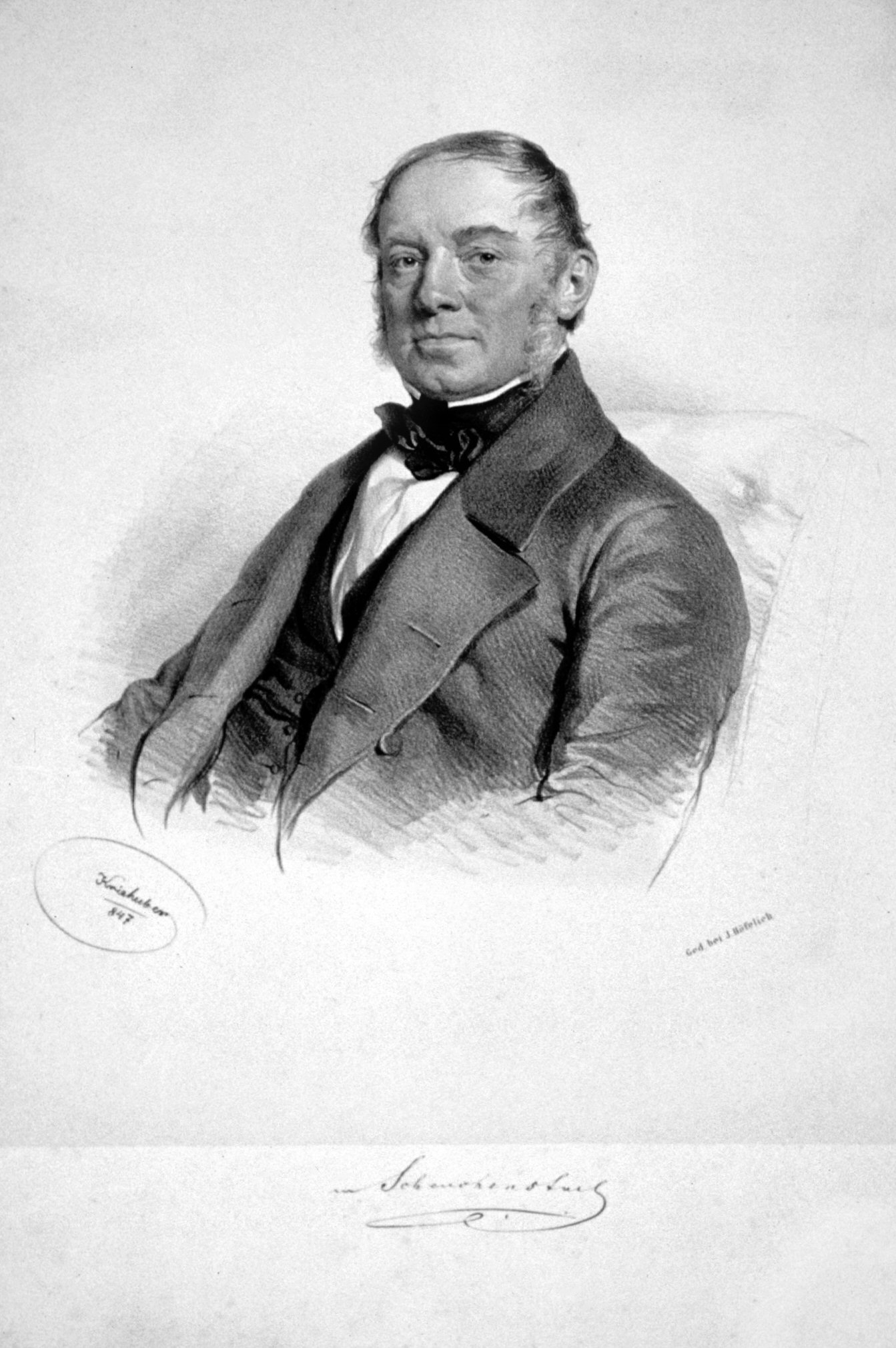 Karl Freiherr von Scheuchenstuel (1792–1867), Industrieller, Montanist, Beamter. Lithographie von Josef Kriehuber, 1847